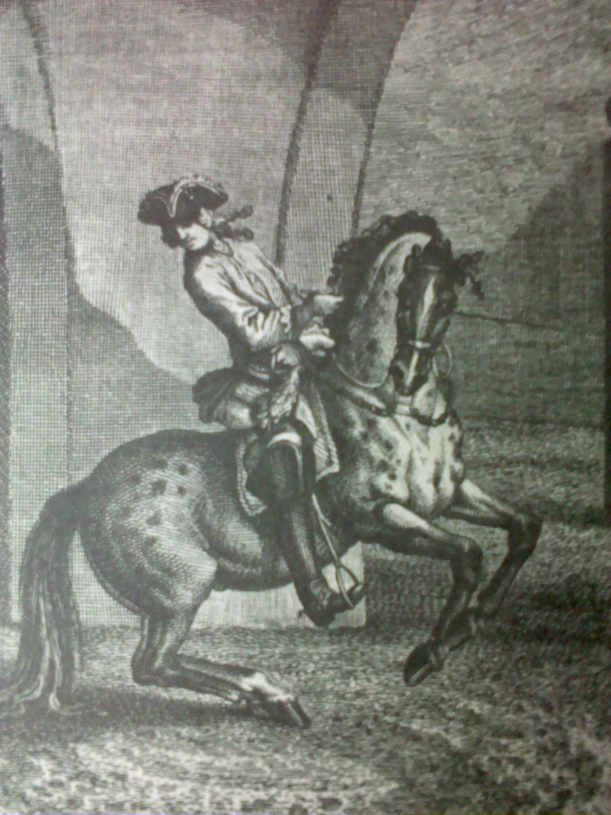 Gravure de Johann Elias Ridinger eprésentant une pirouette en dressage classique.